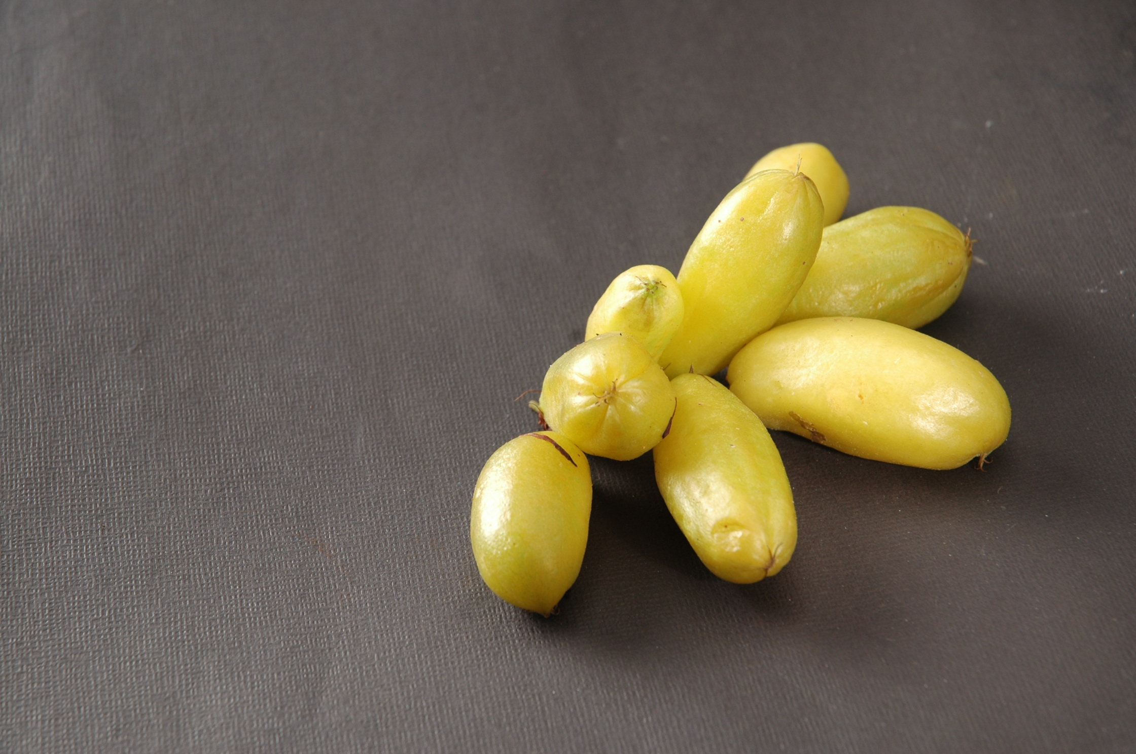 Averrhoa bilimbi, ripe. Indonesia: Belimbing wuluh